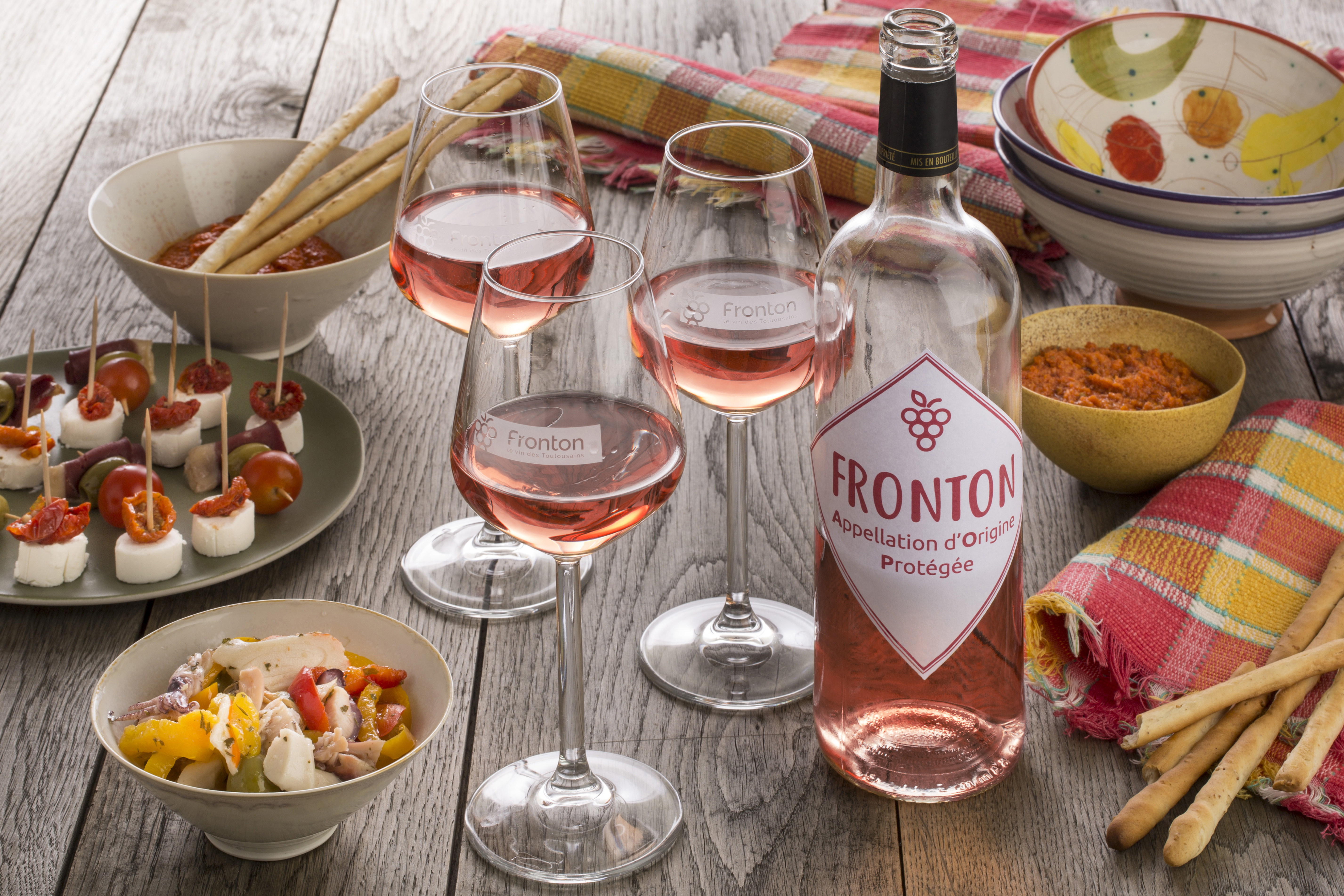 Bouteille de Rosé AOC Fronton